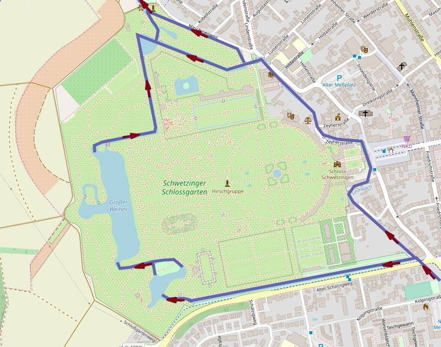 Flusssystem des Leimbachs im Schlossgarten Schwetzingen This map may be incomplete, and may contain errors. Don't rely solely on it for navigation.